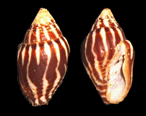 Pardalinops testudinaria (synonym :Pyrene testudinaria)